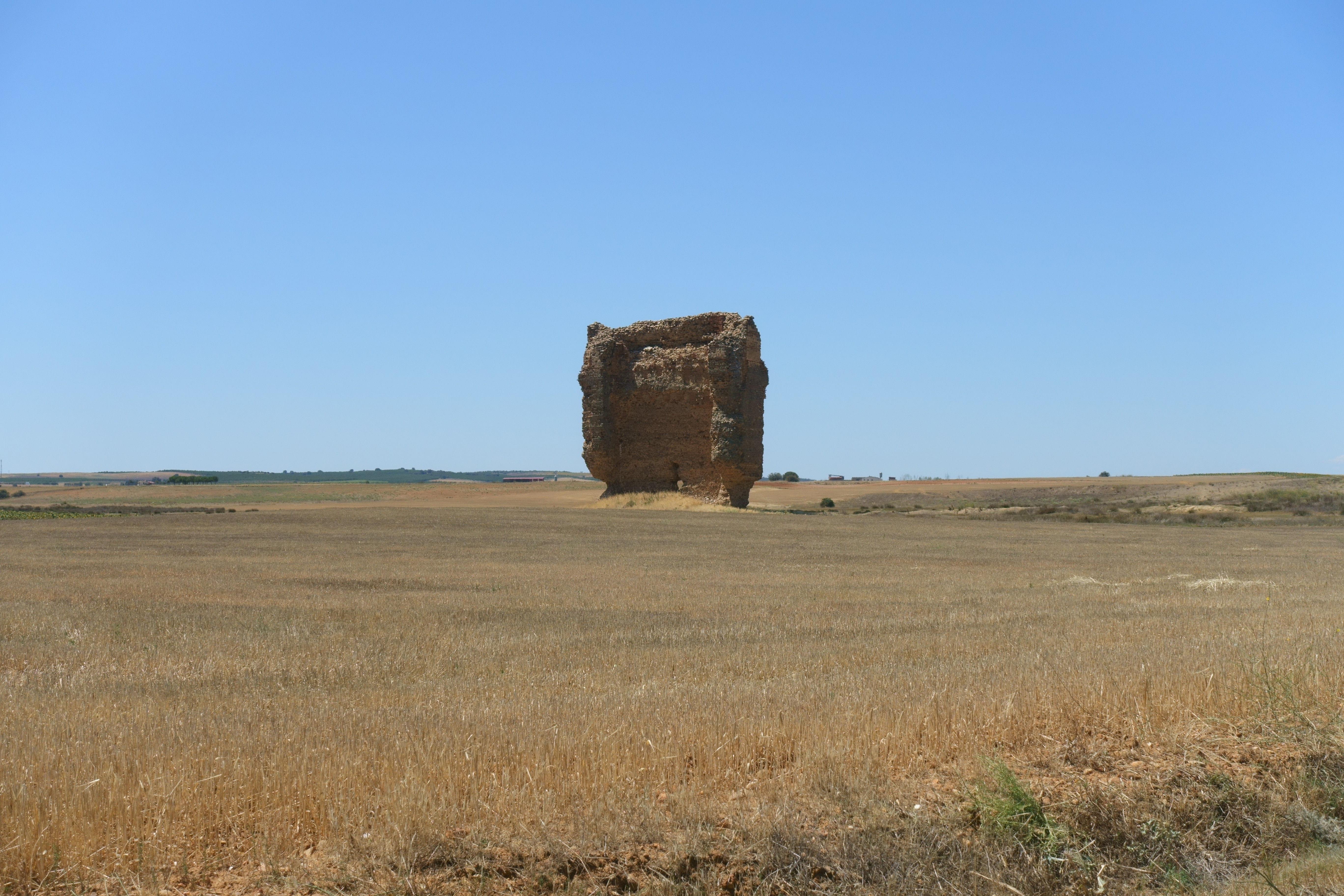 Restos de la iglesia del Salvador, en el despoblado de Amaldos (Quintanilla del Monte, Zamora, España).